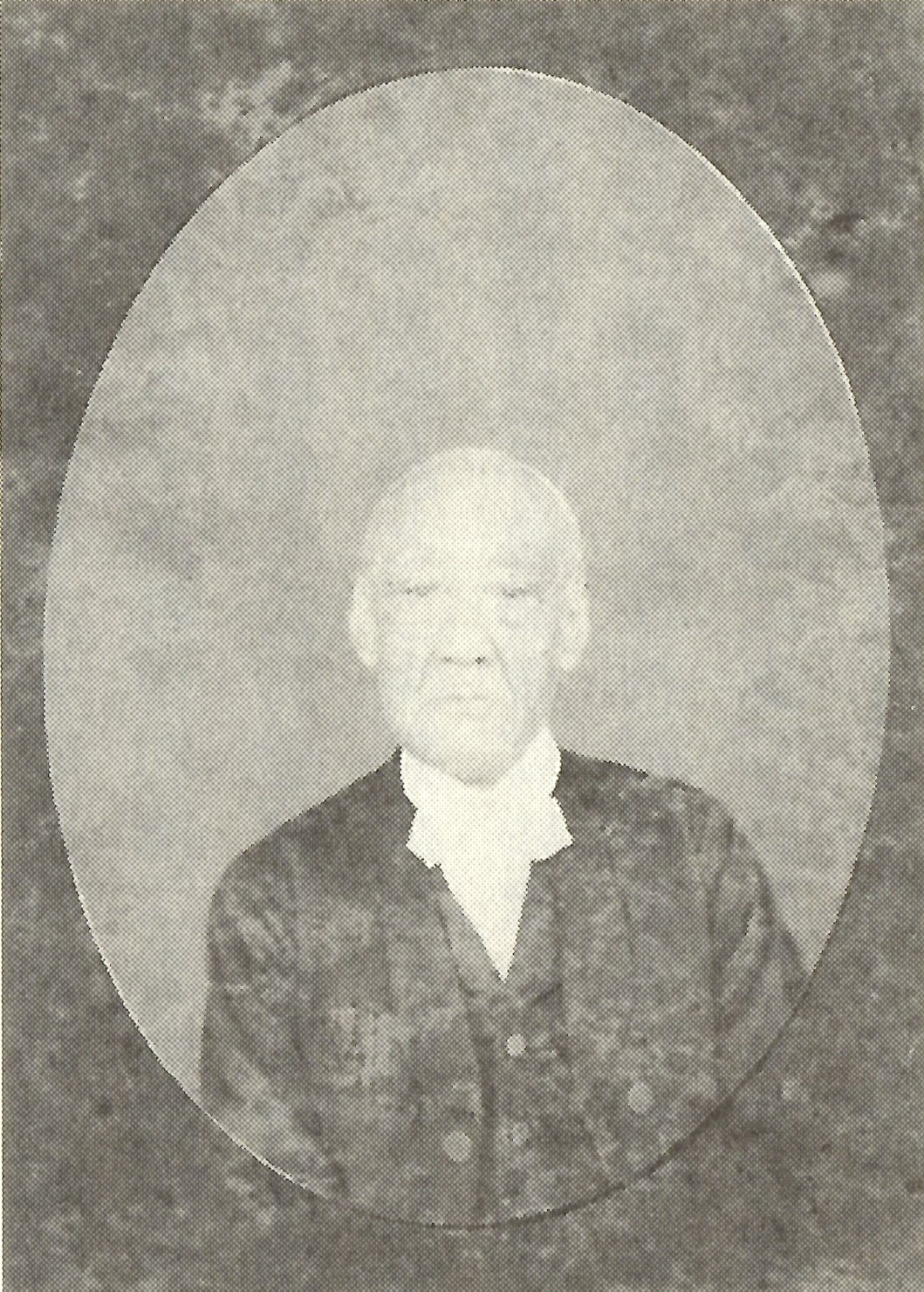 冷泉為理の肖像写真。